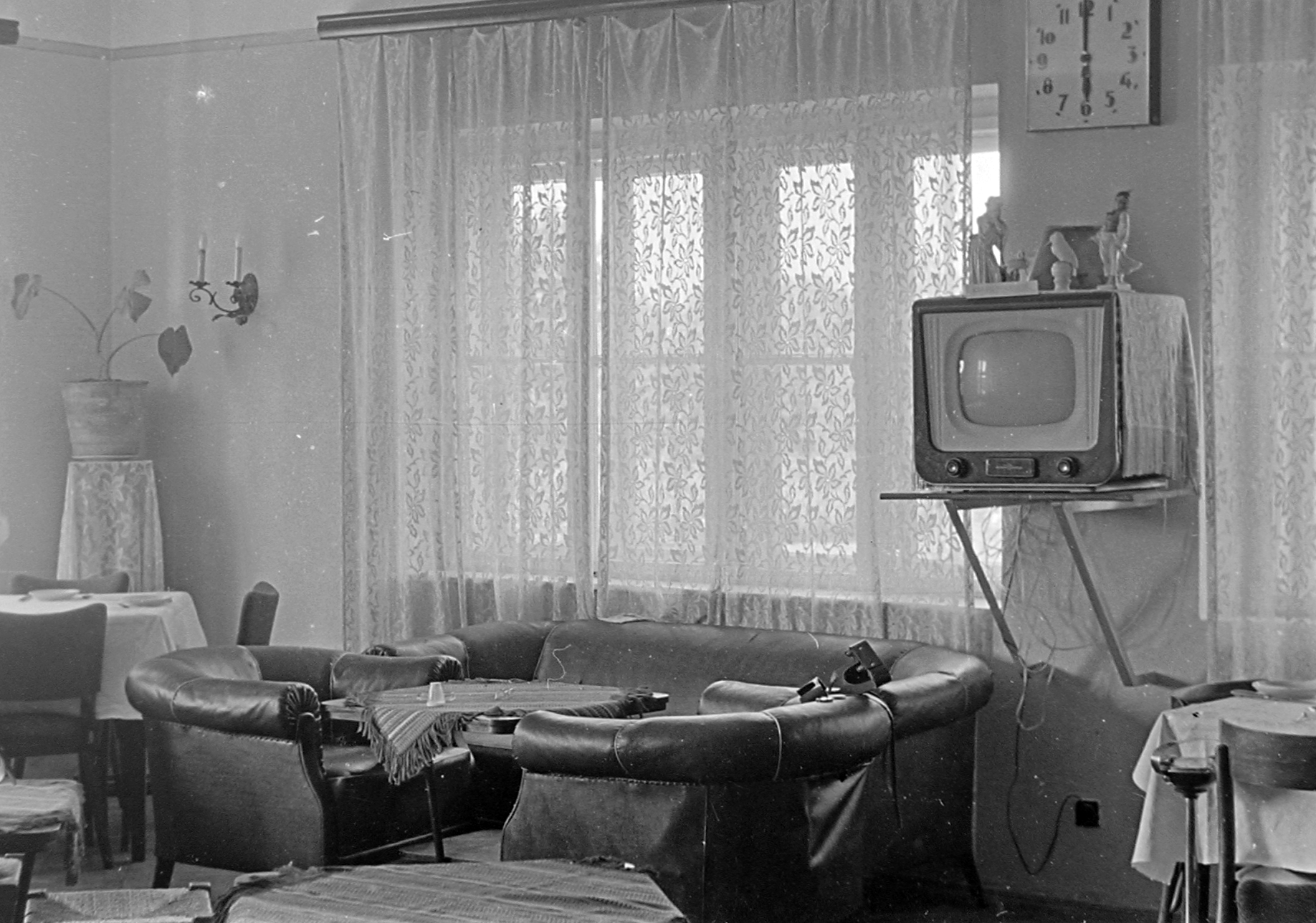 ORION AT 501 televízió készülék